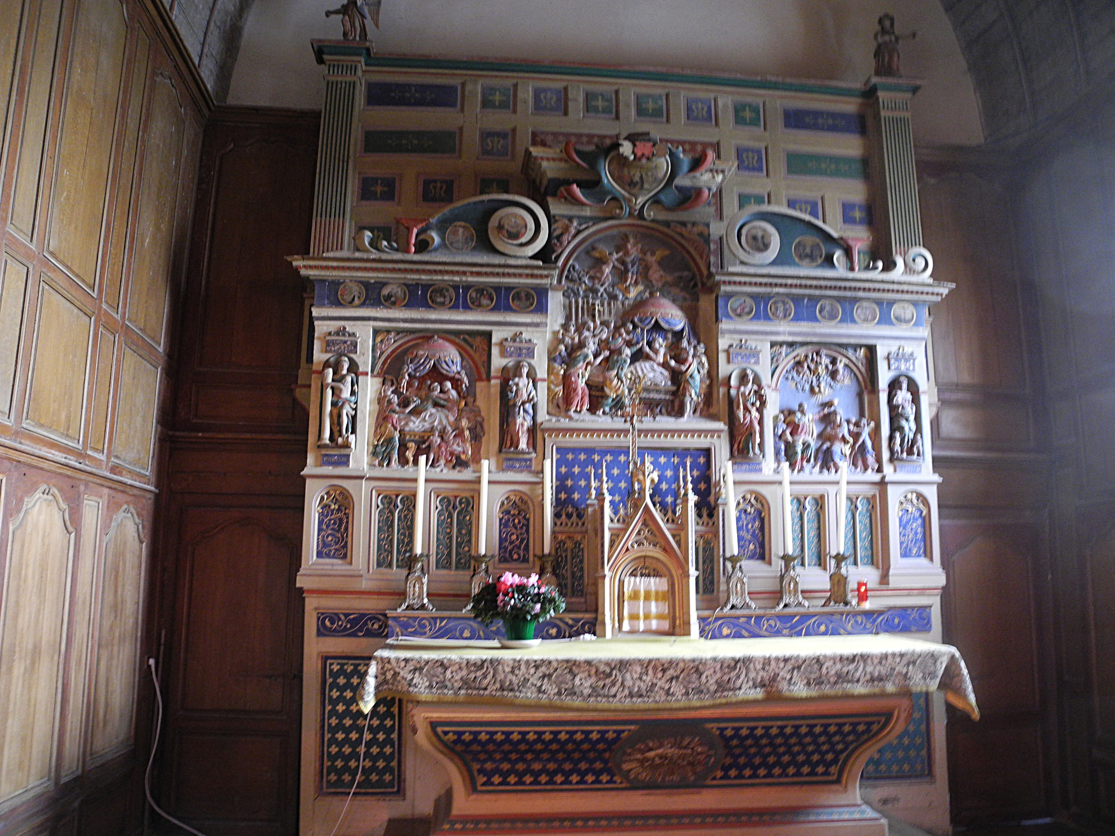 Le retable du fond du choeur dans l'église du Cormier (Eure)